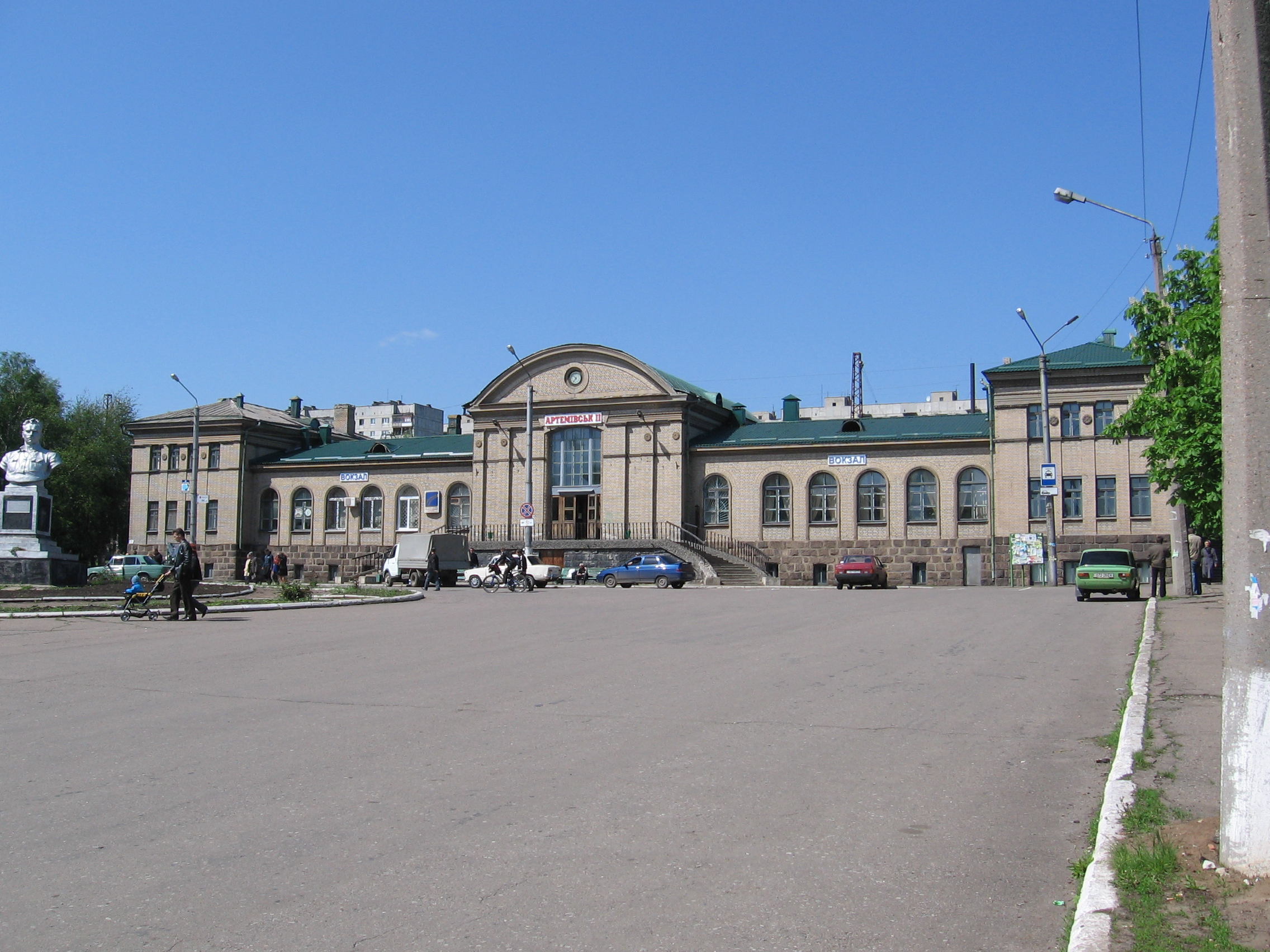 Сучасний залізничний вокзал у місті Артемівську (Донецька область)